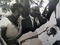 אסתר, משה ועדה זמורה